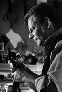 Alberto Giordano